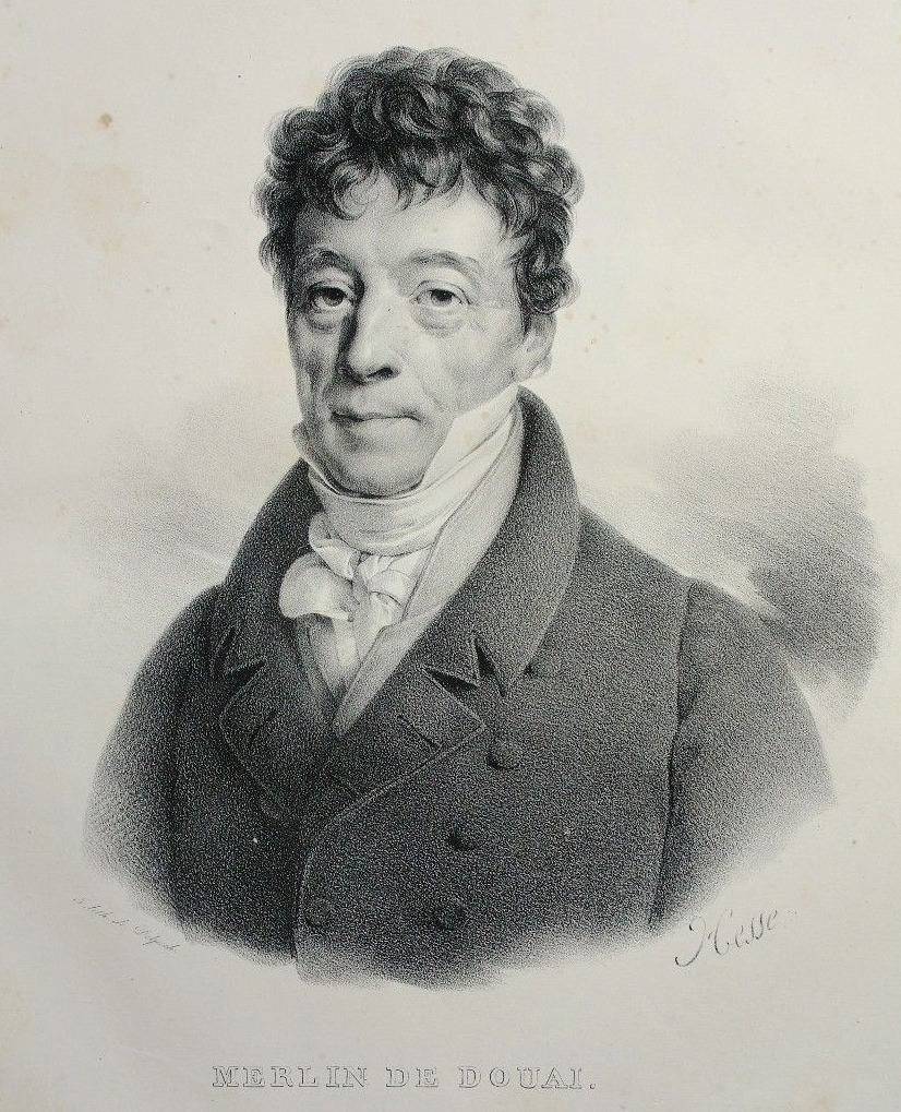 Philippe-Antoine Merlin de Douai, lithographie de Delpech vers 1820.